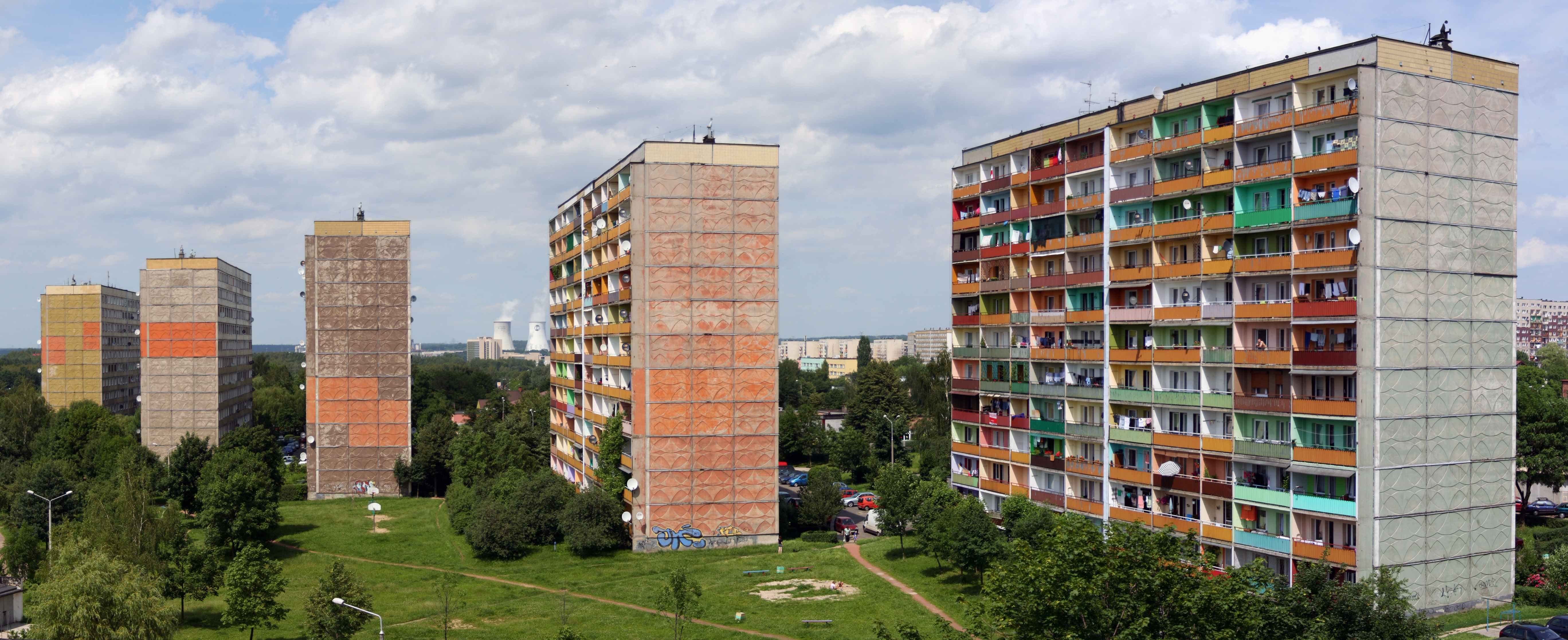 Fragment osiedla Nowiny w Rybniku - ul. Chabrowa